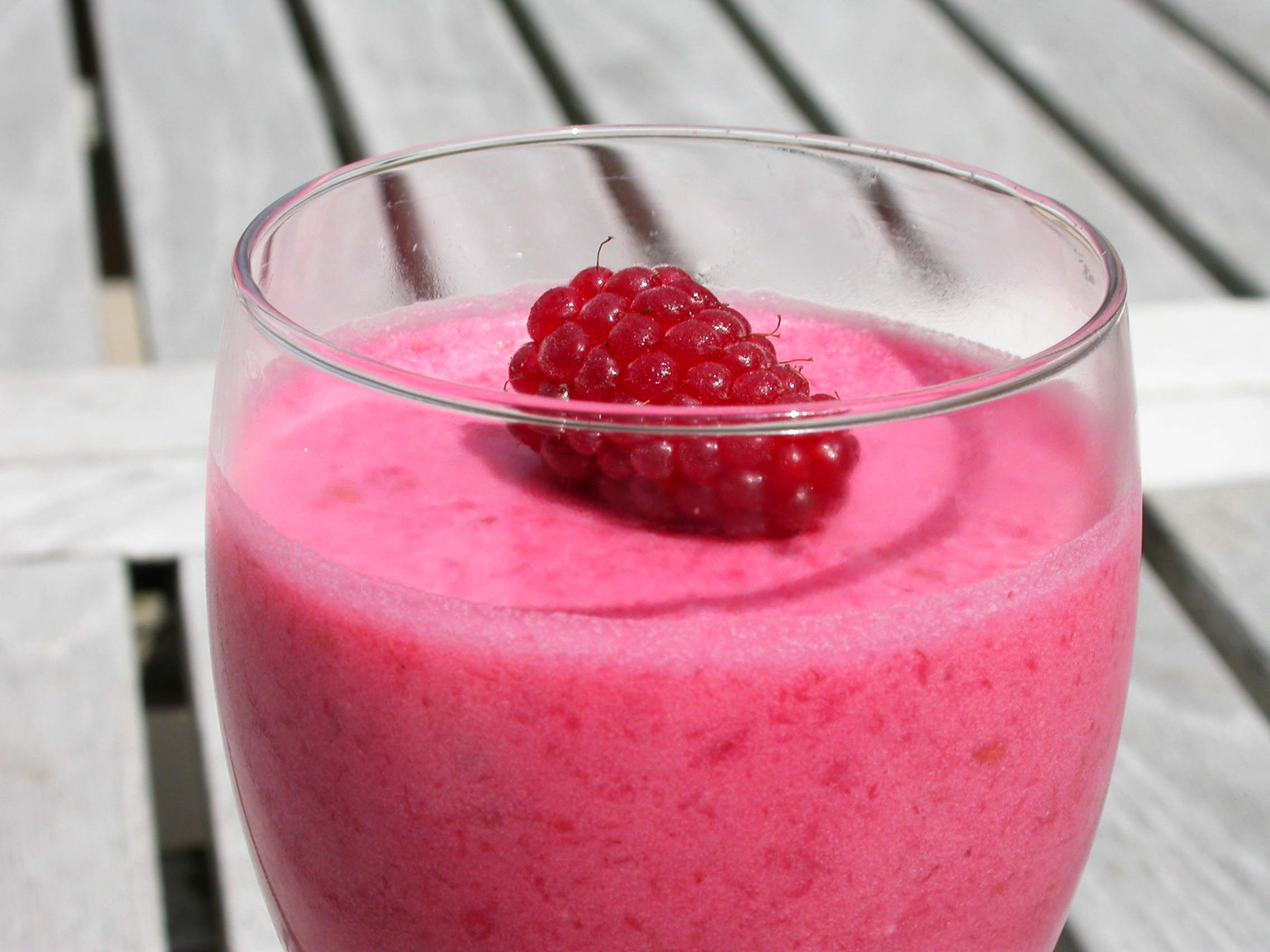 Frambozenframbois (Berlare, Be)